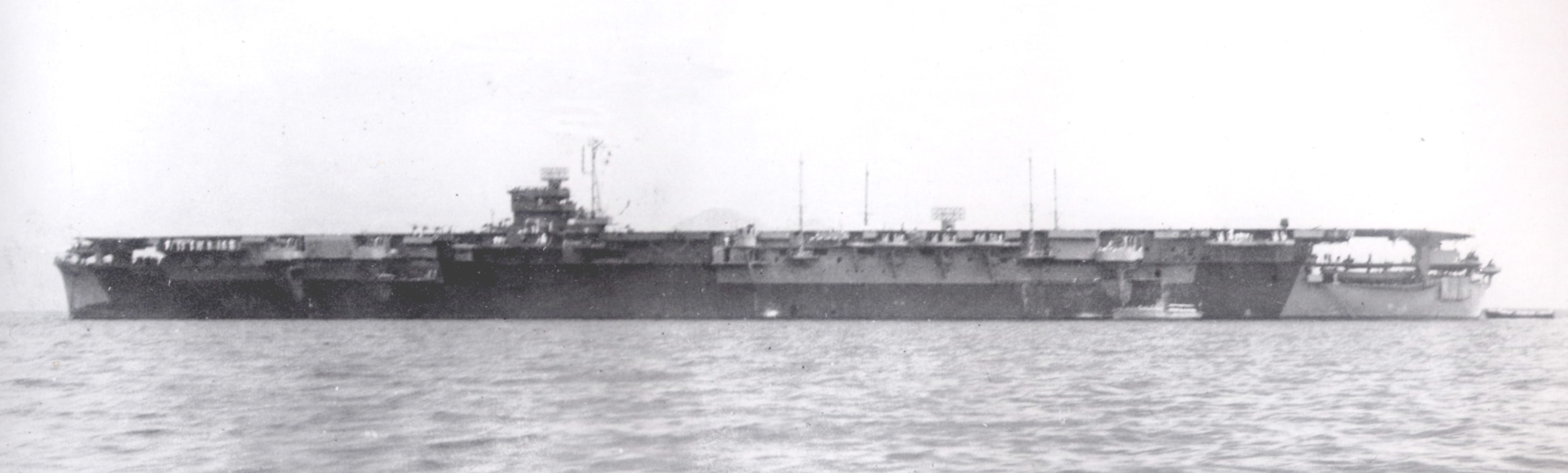 日本海軍航空母艦 雲龍型「天城」。三菱長崎造船所にて完成時の写真。